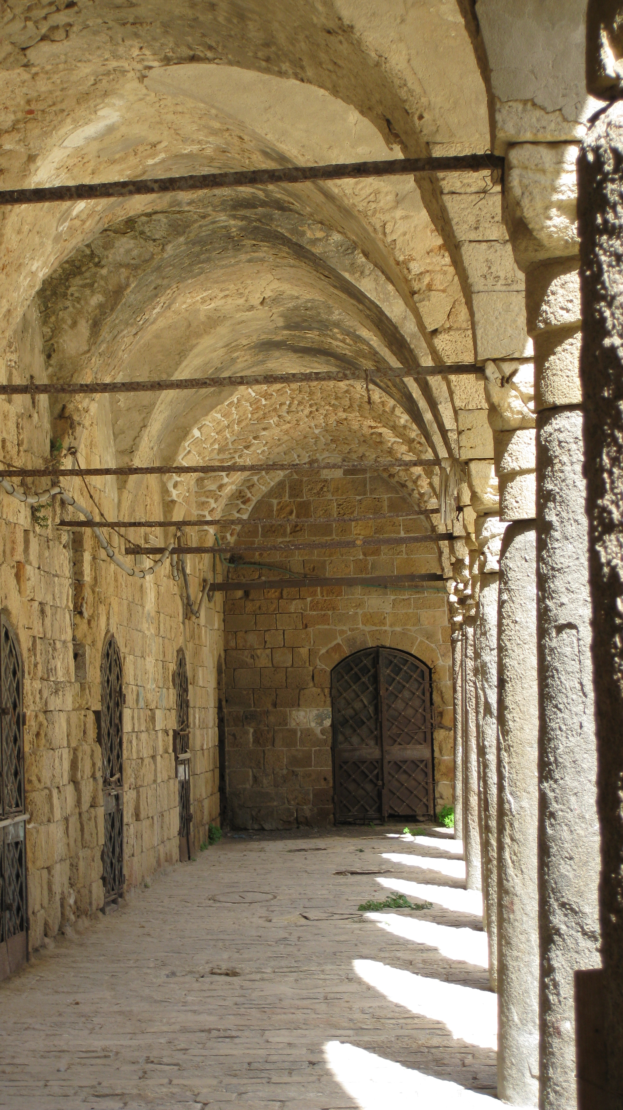 Acco (Acre, Akko) - Khan al-Umdan עכו - חאן אל עומדאן